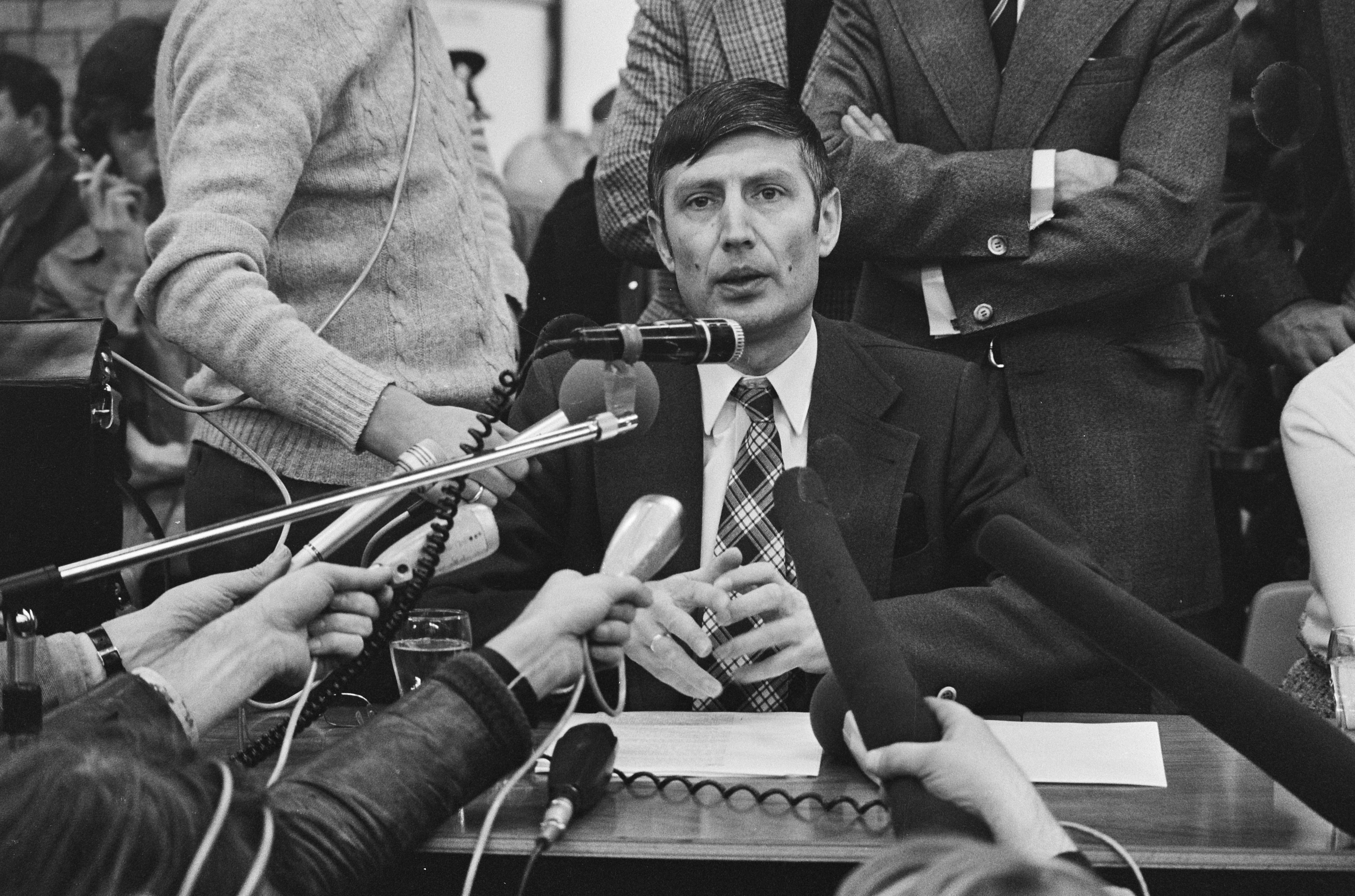 Einde gijzeling in trein bij Wijster: Minister Van Agt tijdens persconferentie na afloop gijzeling